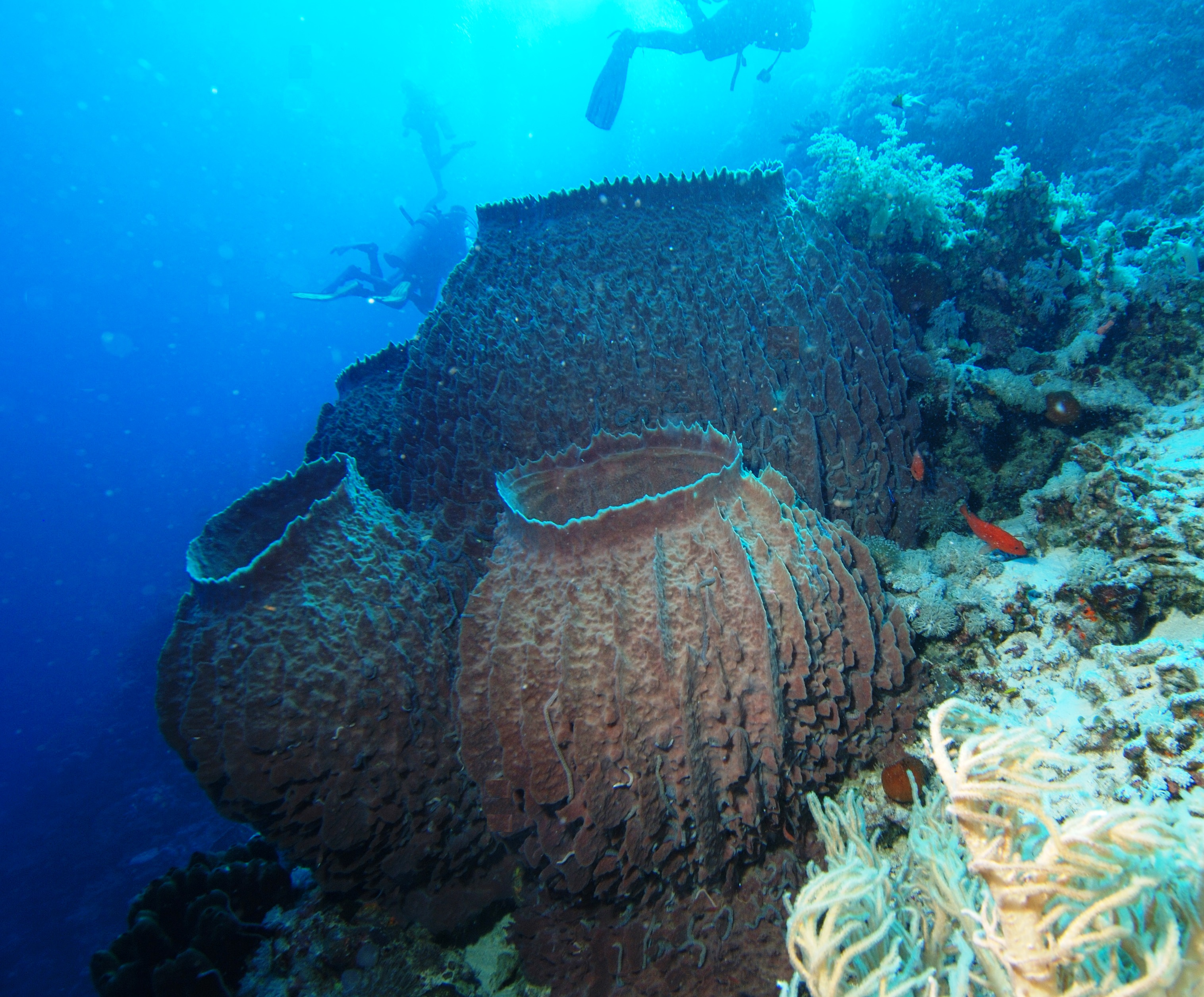 Tonspons